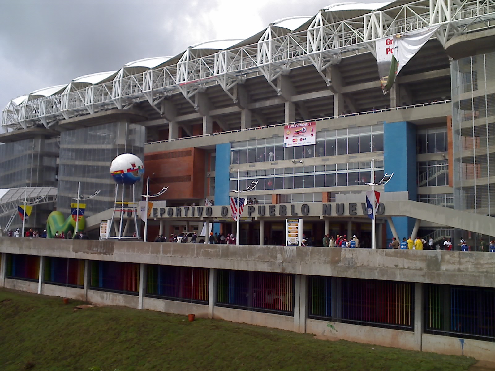 Imagen del estadio "Polideportivo de Pueblo Nuevo" durante un juego de la Copa America 2007.